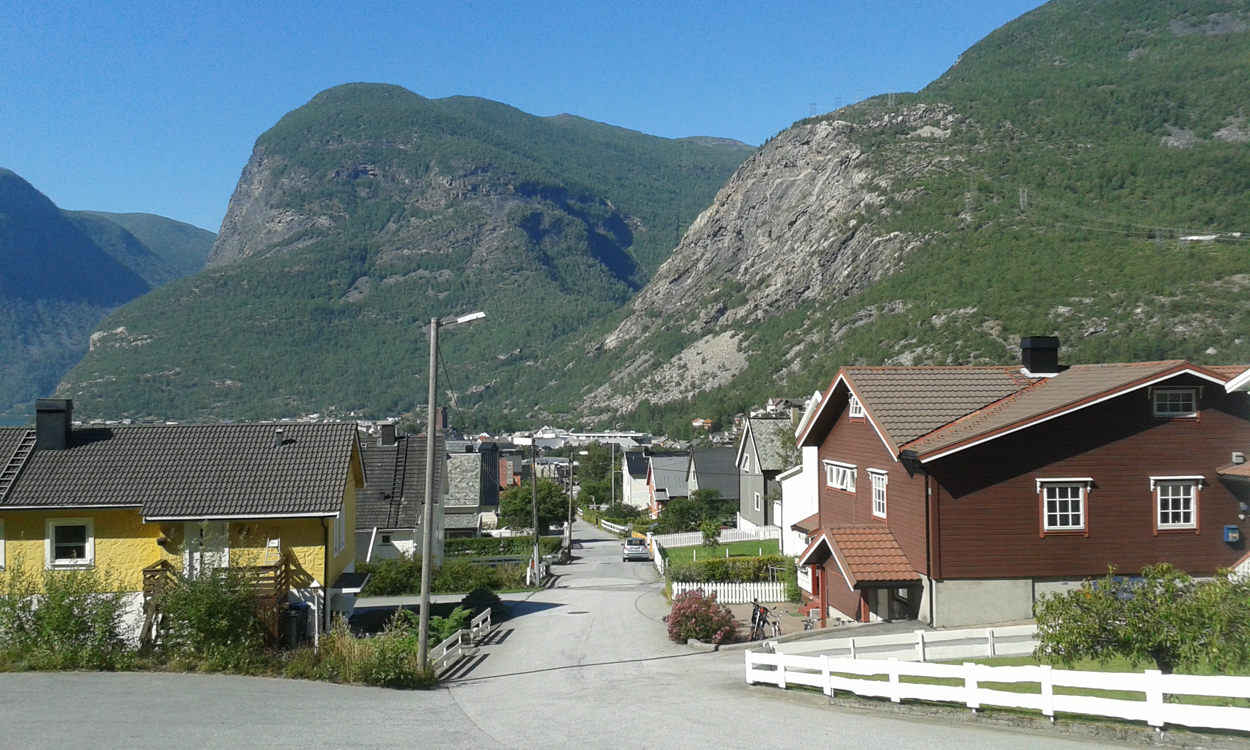 Årdal в августе 2015, вида на скалу над заводом Гидро Алюминиум